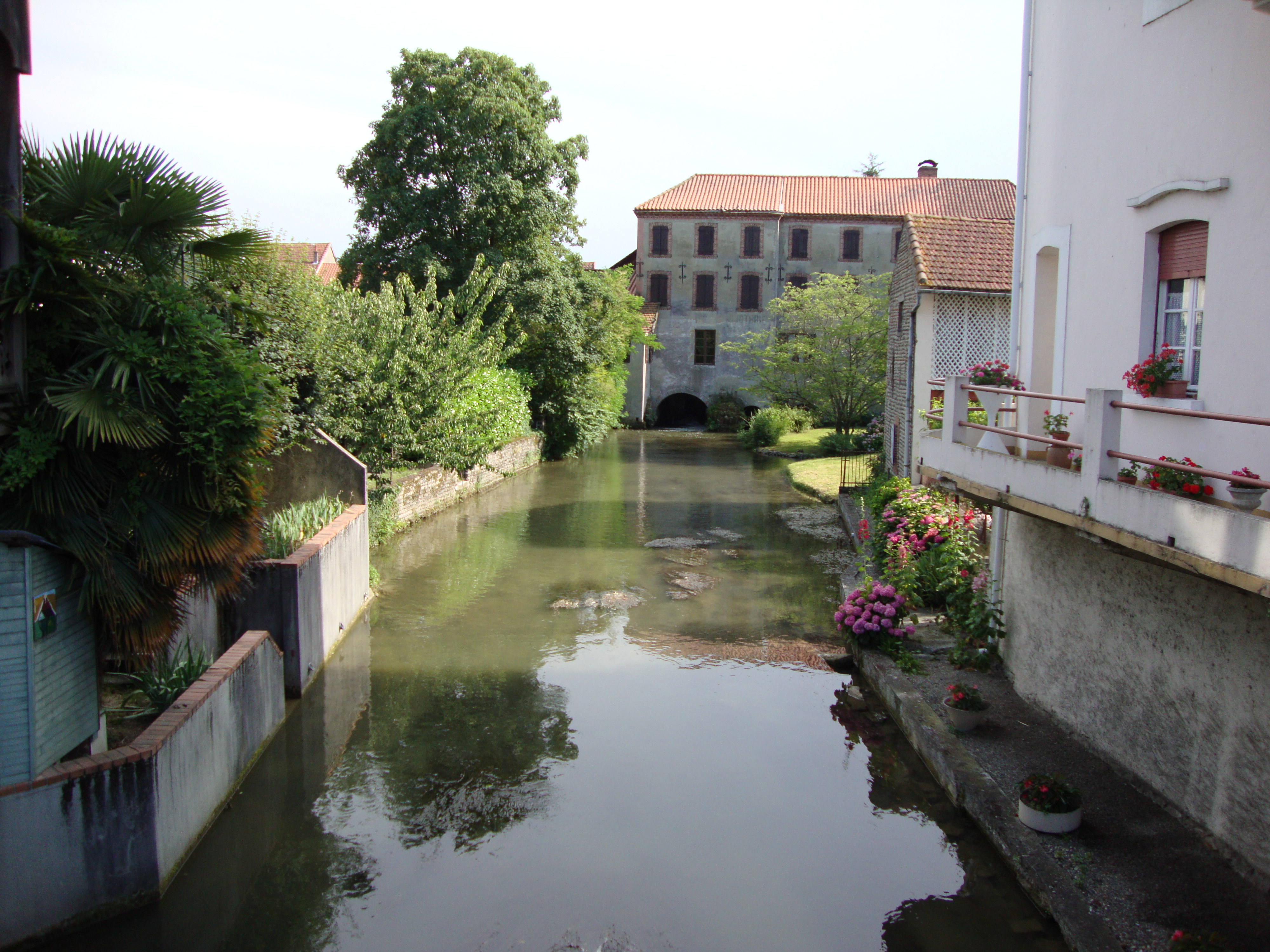 Maubourguet (Hautes-Pyr, Fr) moulin sur l'Échez